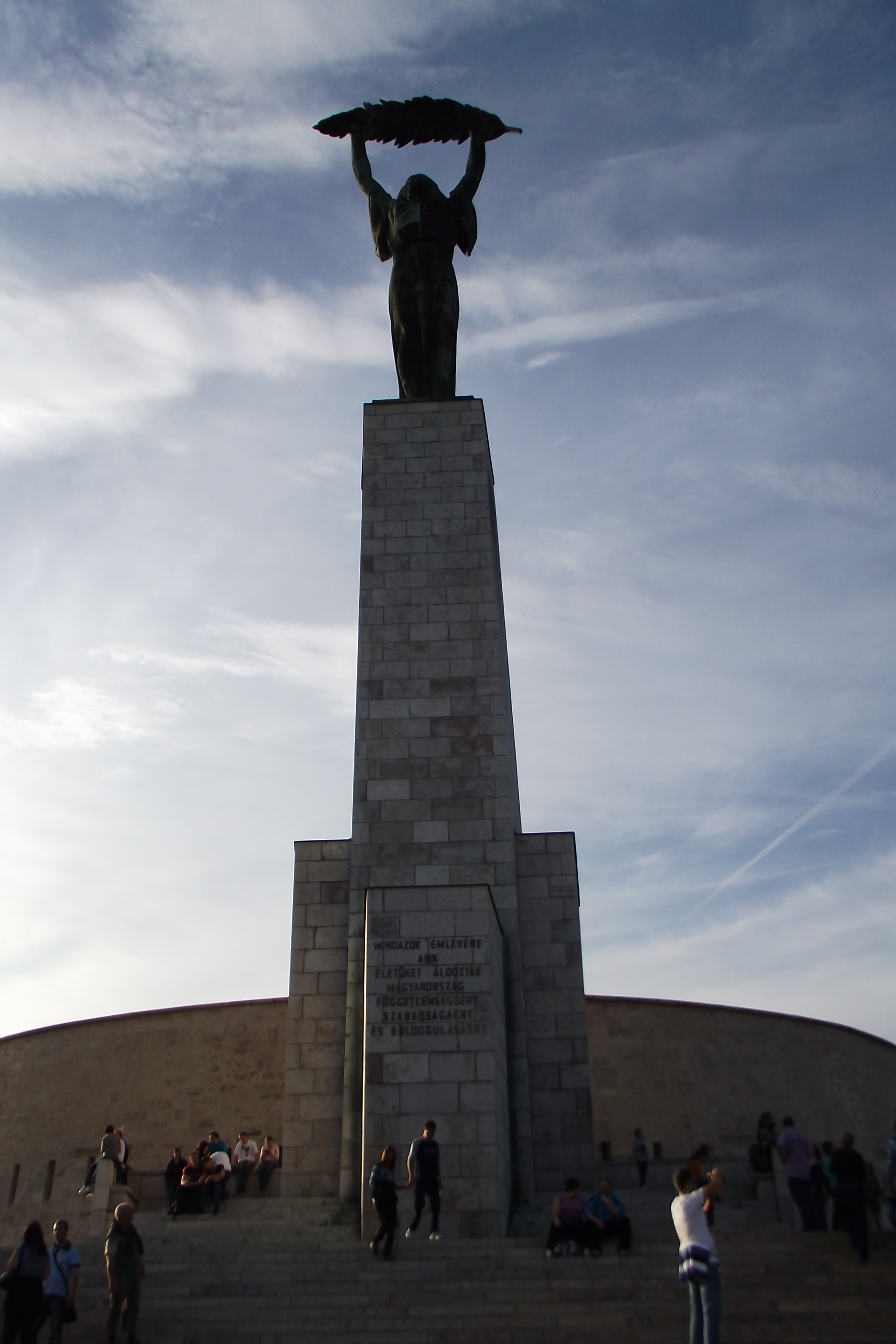 Budapest Szabadságszobor a Gellért-hegyen